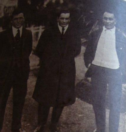 Harry Hayes, Ennis Hayes y Zenón Díaz en la previa del enfrentamiento de la Selección Argentina ante Uruguay por el Campeonato Sudamericano 1916.